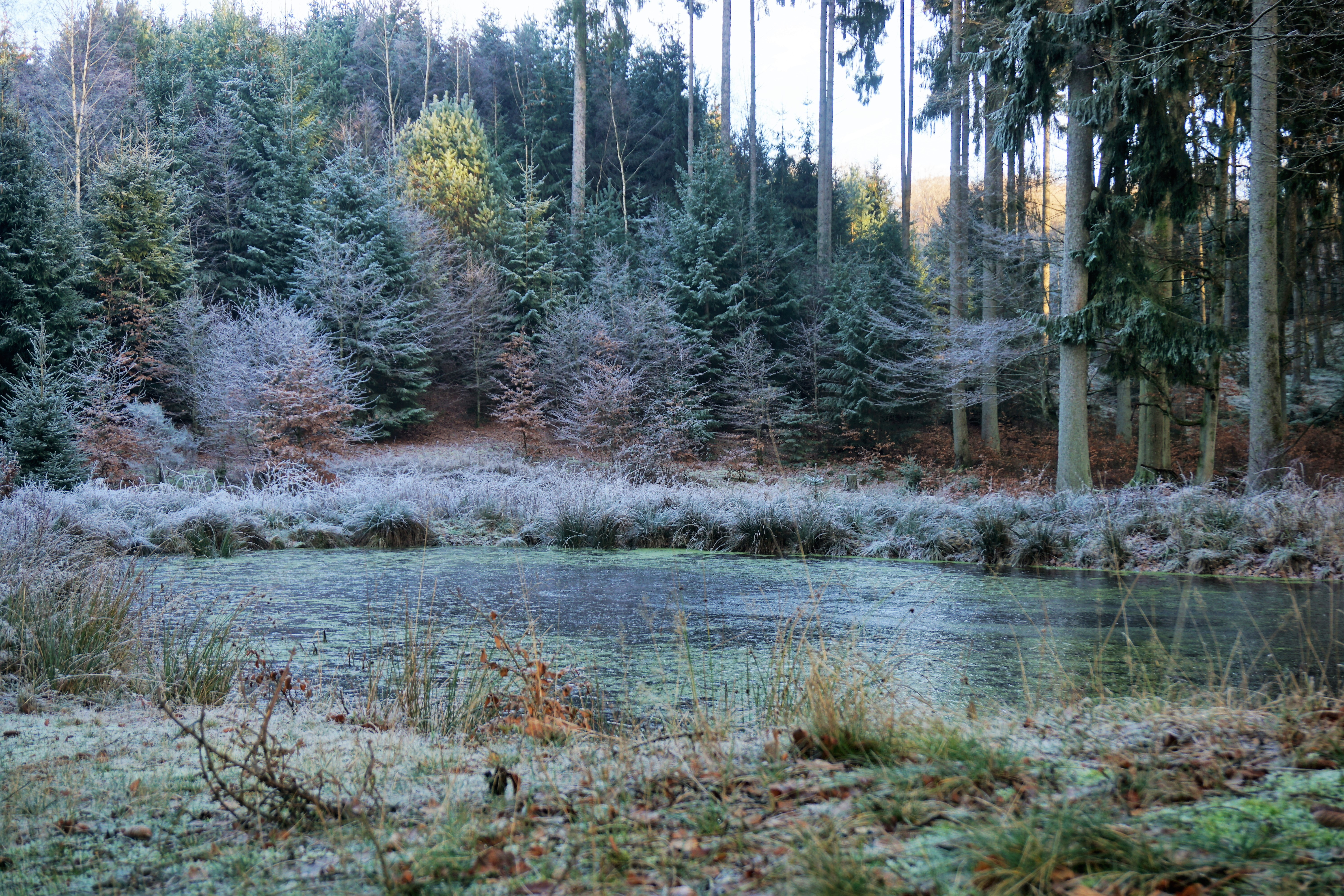 Steinsel, un étang gelé près de l'aire d'agrainage Déiwendallerwee au Grunewald.